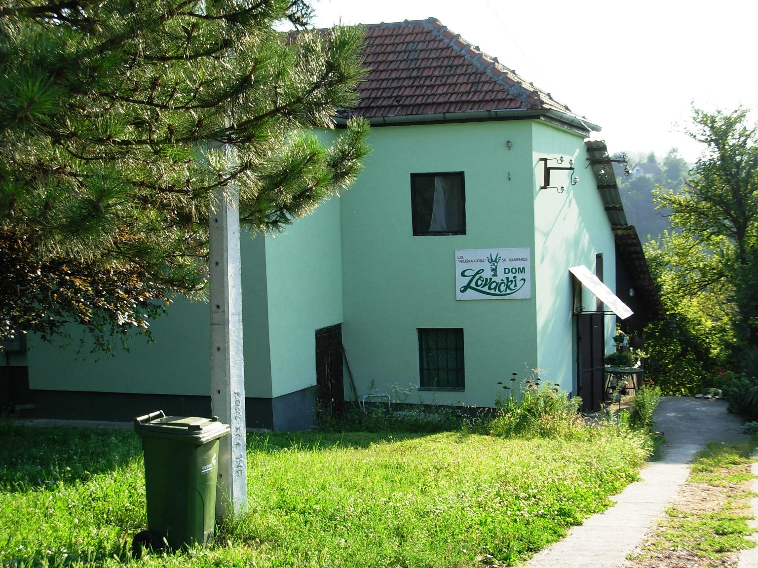 Lovački dom "Fruška gora", koji se nalazi na Fruškogorskom putu na Popovici.